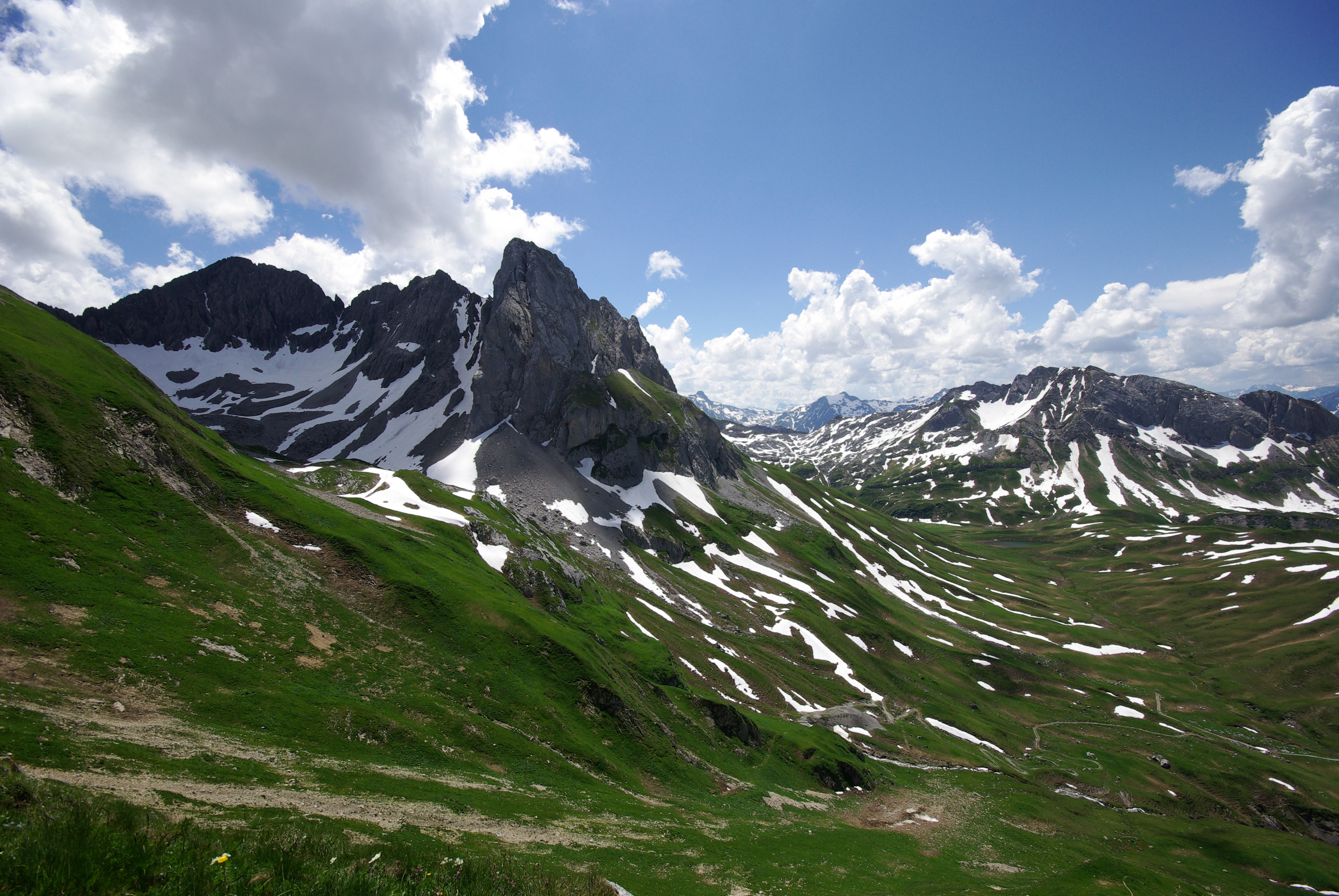 Blick auf die Untere Wildgrubenspitze (links, 2.753 m), rechts daneben die Roggalspitze (2.673 m). Im Hintergrund sind die Pflunspitzen (2912 m) und die Östliche Eisentaler Spitze (2753 m). Zwischen diesen beiden in der Ferne der Große und Kleine Piz Buin. Rechts die Ronspitze (2498m).